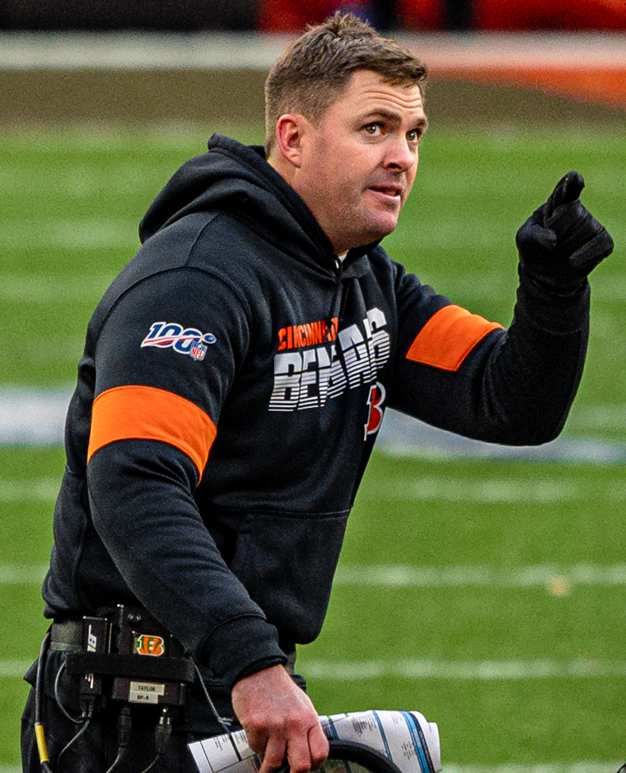 Zac Taylor